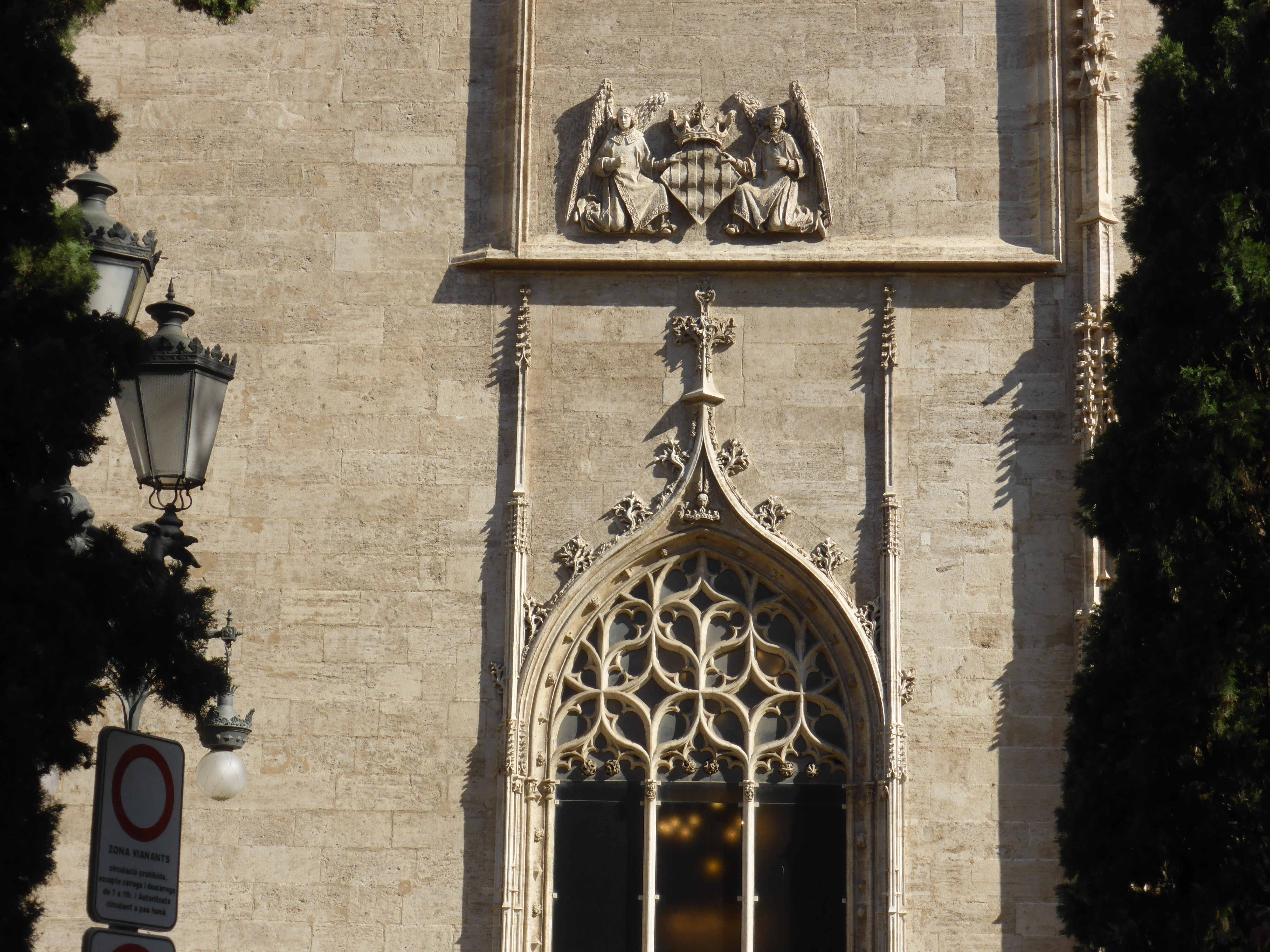 Lonja de la Seda de Valencia o Lonja de los Mercaderes (en valenciano Llotja de la Seda o Llotja de Mercaders). Declarada por la UNESCO como "Patrimonio de la Humanidad" en 1996.